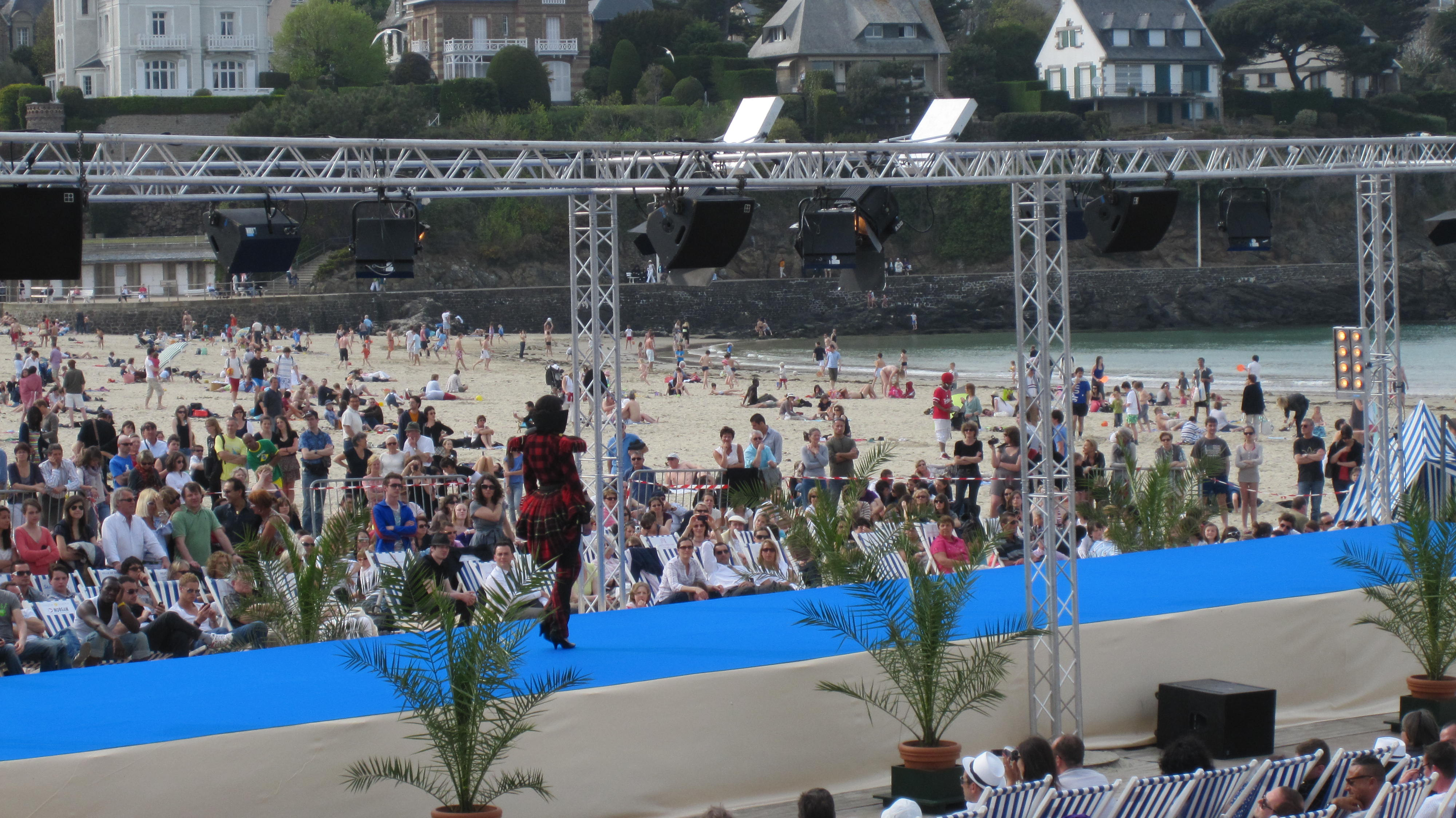 Un défilé du 17ème Festival des jeunes créateurs de mode, à Dinard en avril 2010